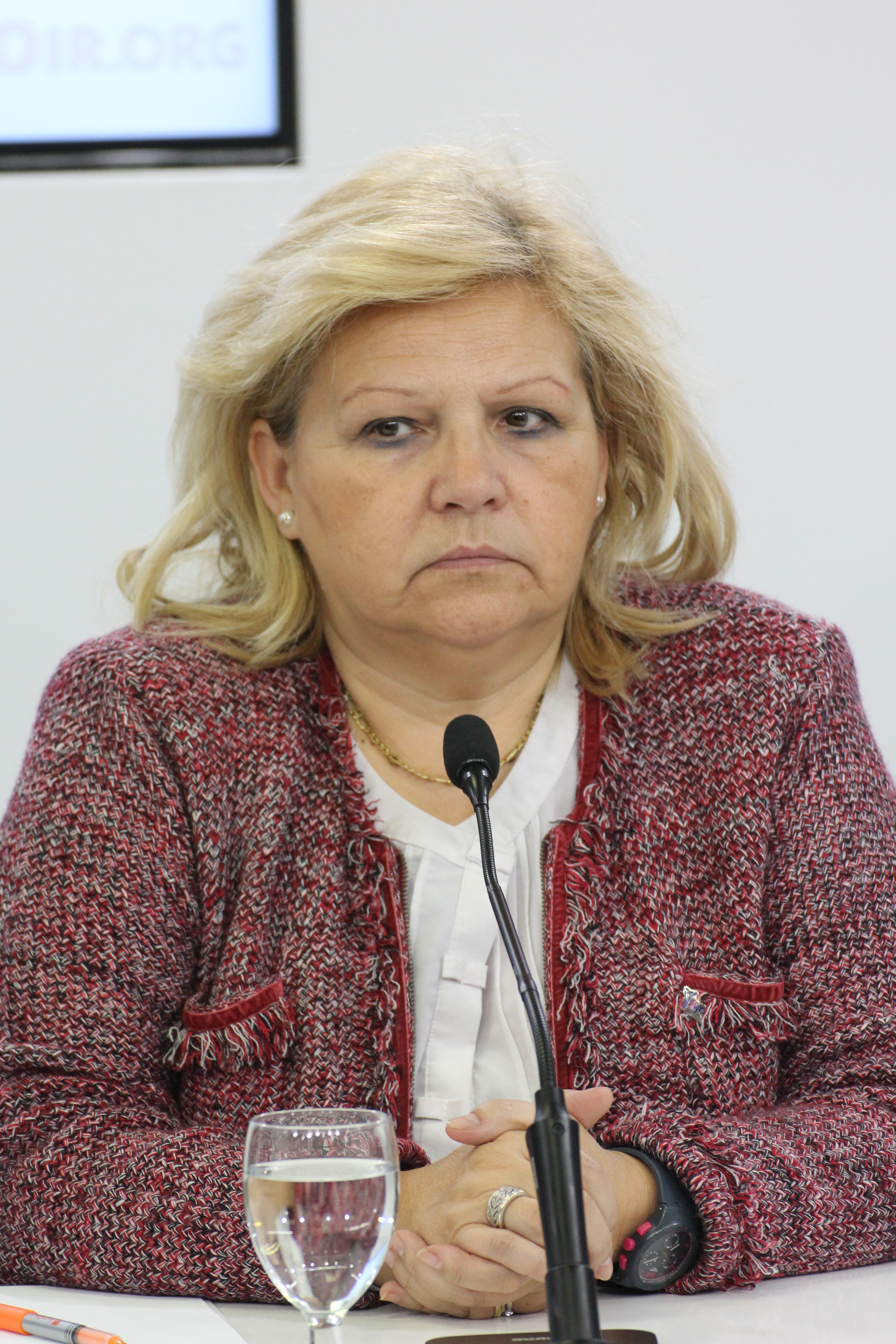 15.01.2015 Tertulia HO La crisis de la derecha en España